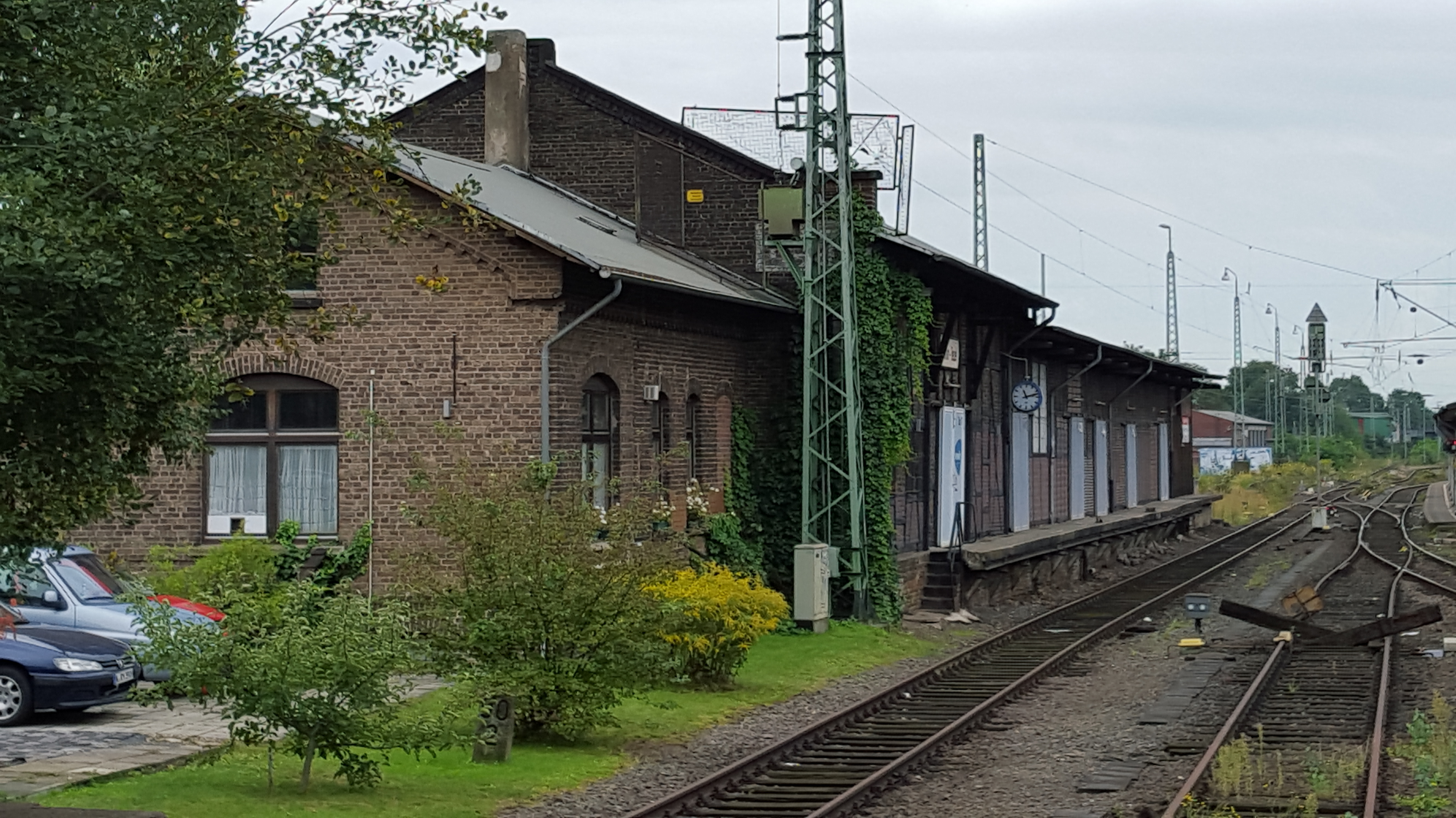 Bahnhof Bonn-Beuel an der Rechten Rheinstrecke in Bonn. Güterschuppen aus Blickrichtung der Kopframpe.